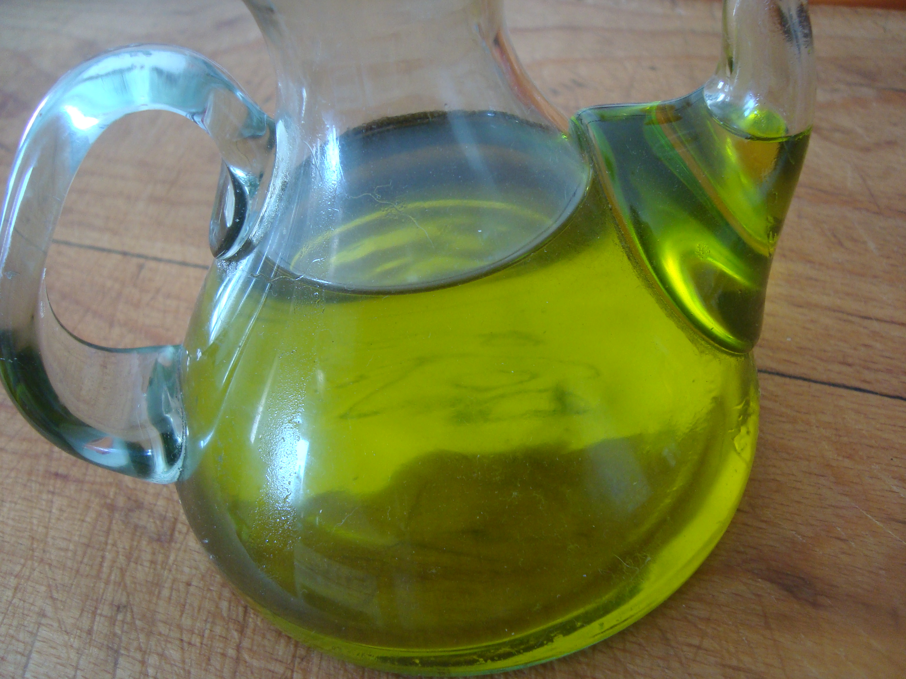 Setrill amb oli d'oliva verge